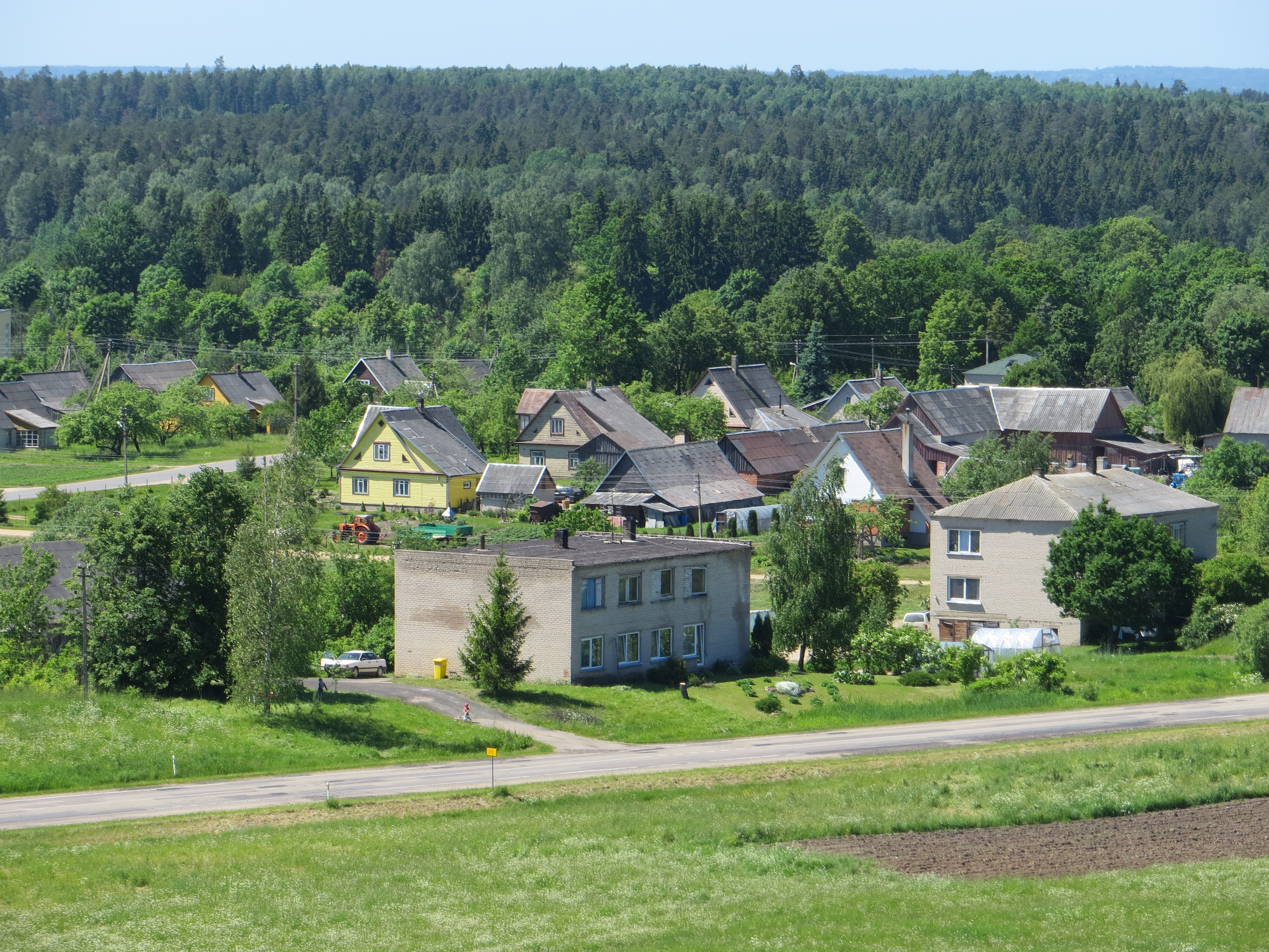 Antazavės sen., Lithuania